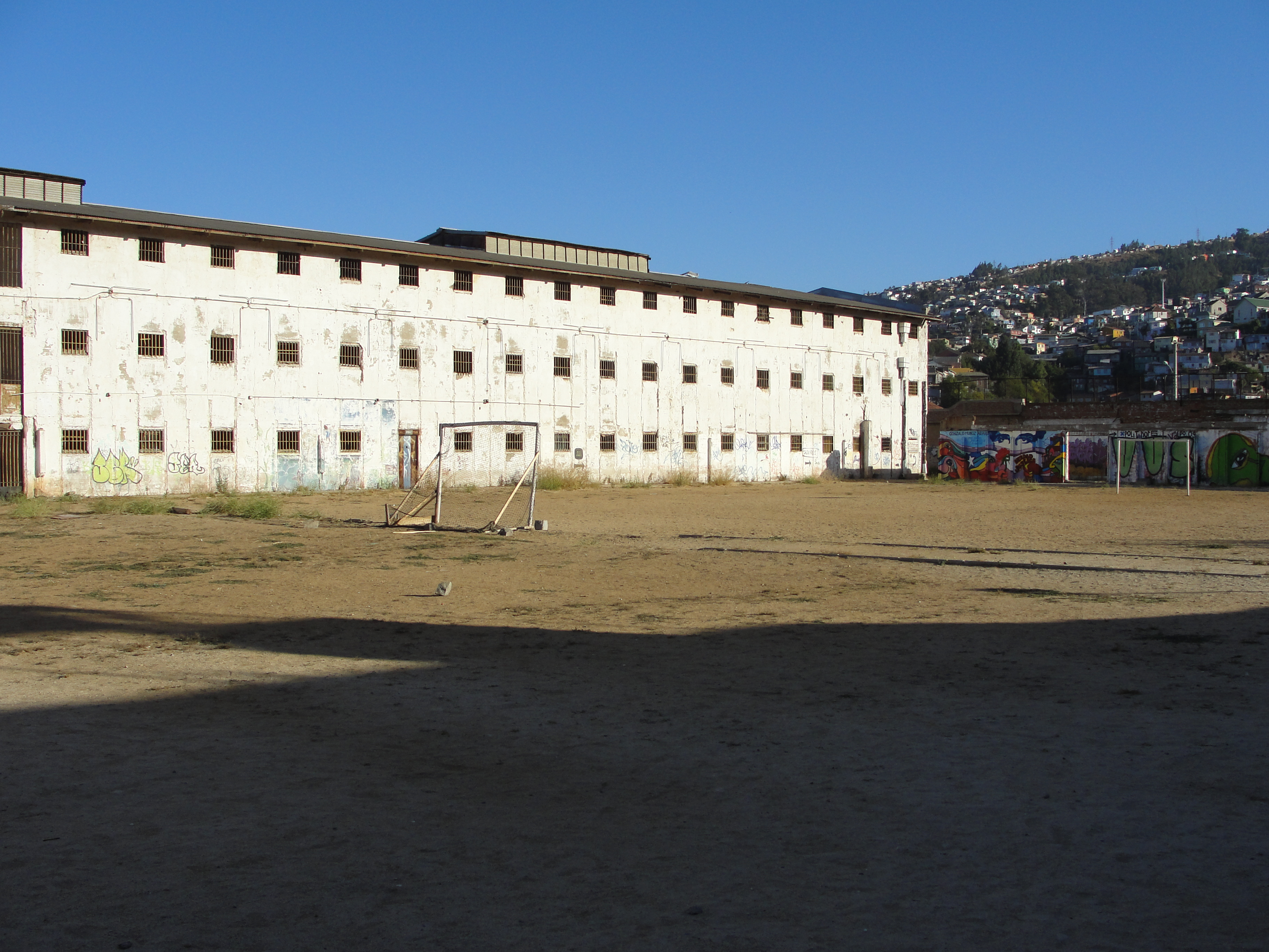 Imagen de la antigua Ex cárcel, actualmente es un centro cultural (el más grande del país) totalmente remodelado.